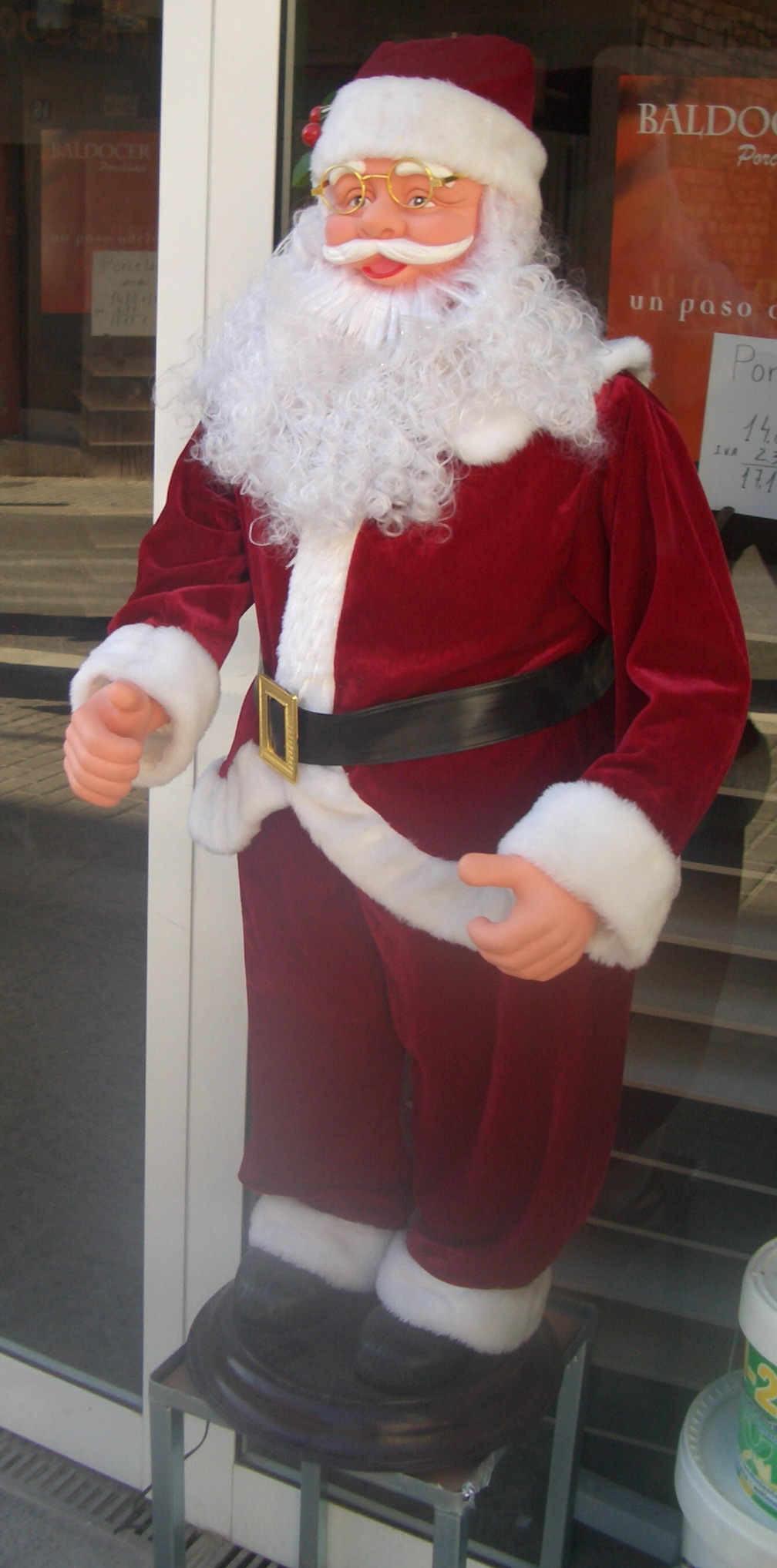 Figura de Papa NoelBarcelona,España.